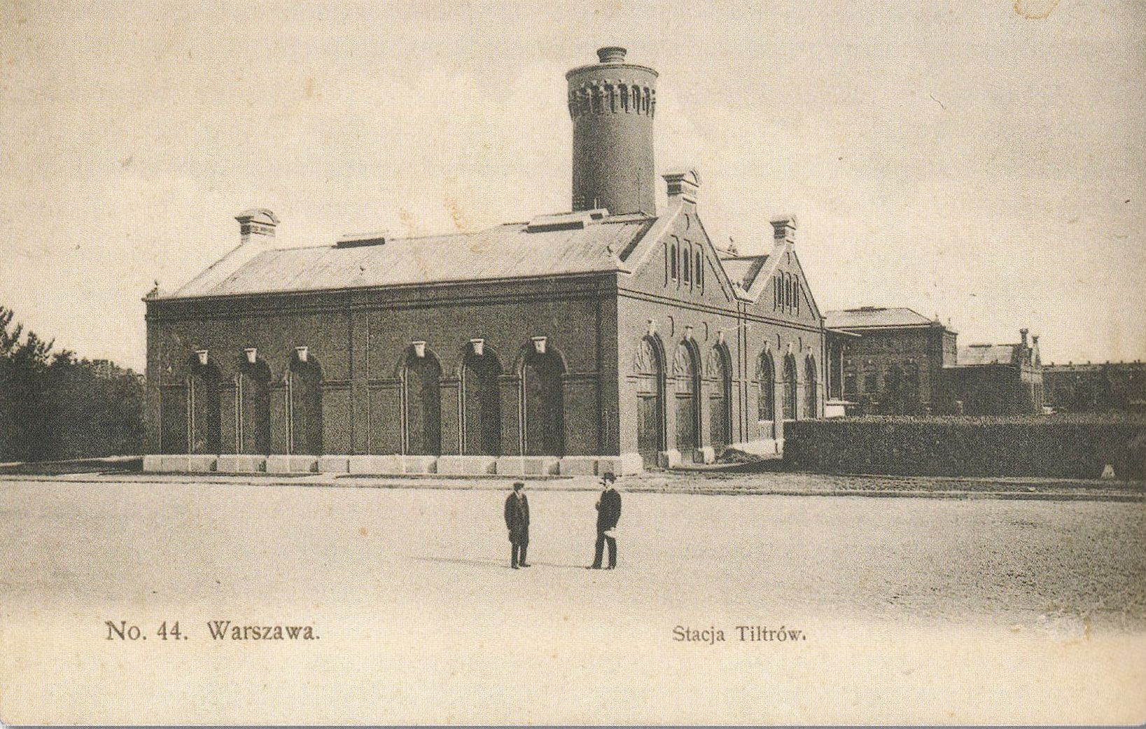 Stacja Filtrów w Warszawie